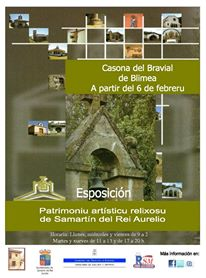 Esposición Patrimoniu relixosu Samartín